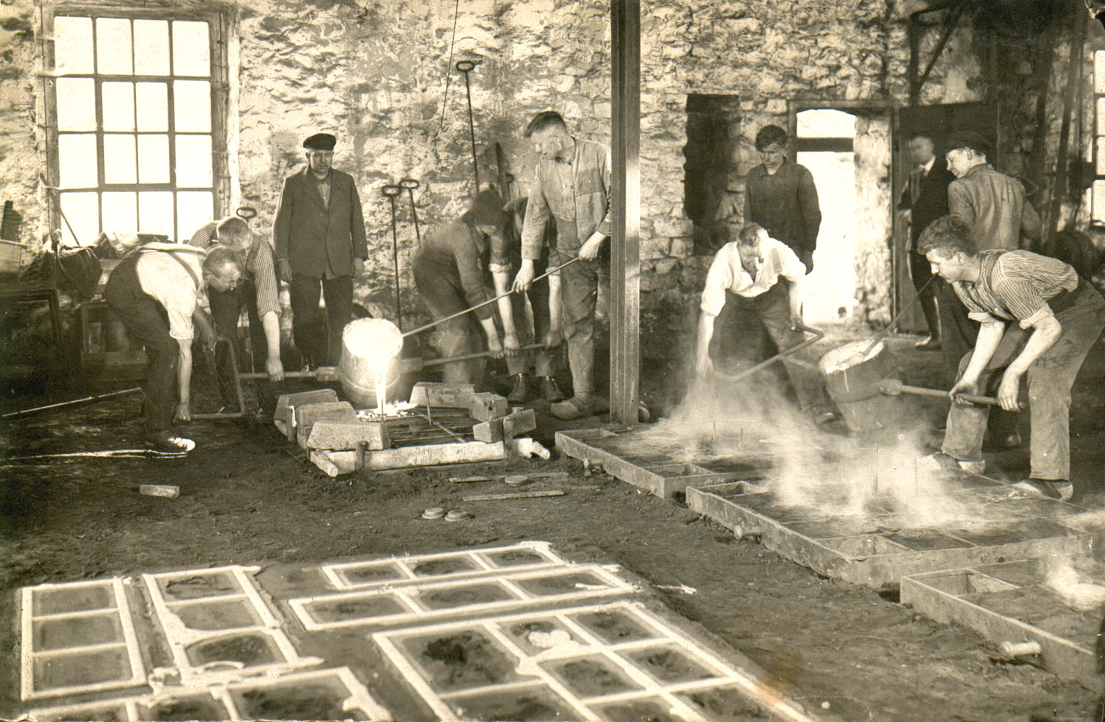 Gießen von Eisenguss-Fensterrahmen